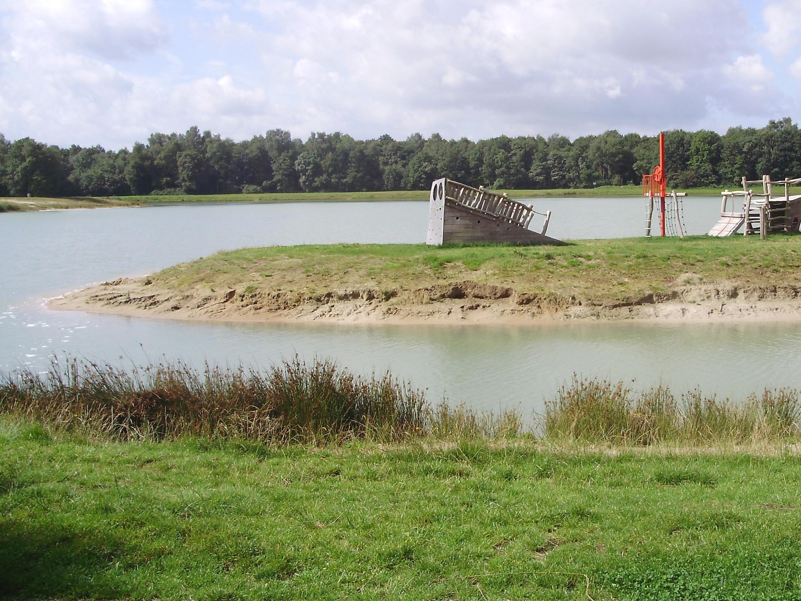 Het Spokeplas bij Noordwolde in gemeente Weststellingwerf (provincie Friesland, Nederland)